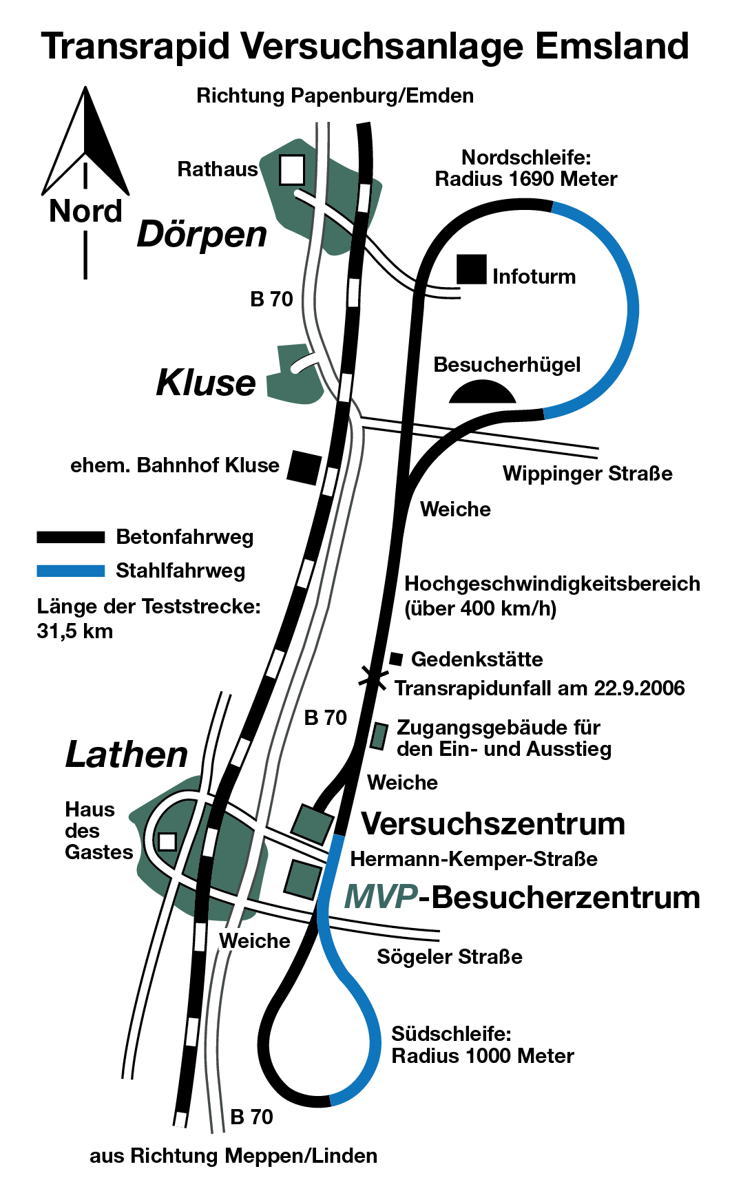 Karte der ehemaligen Transrapid-Teststrecke im Emsland